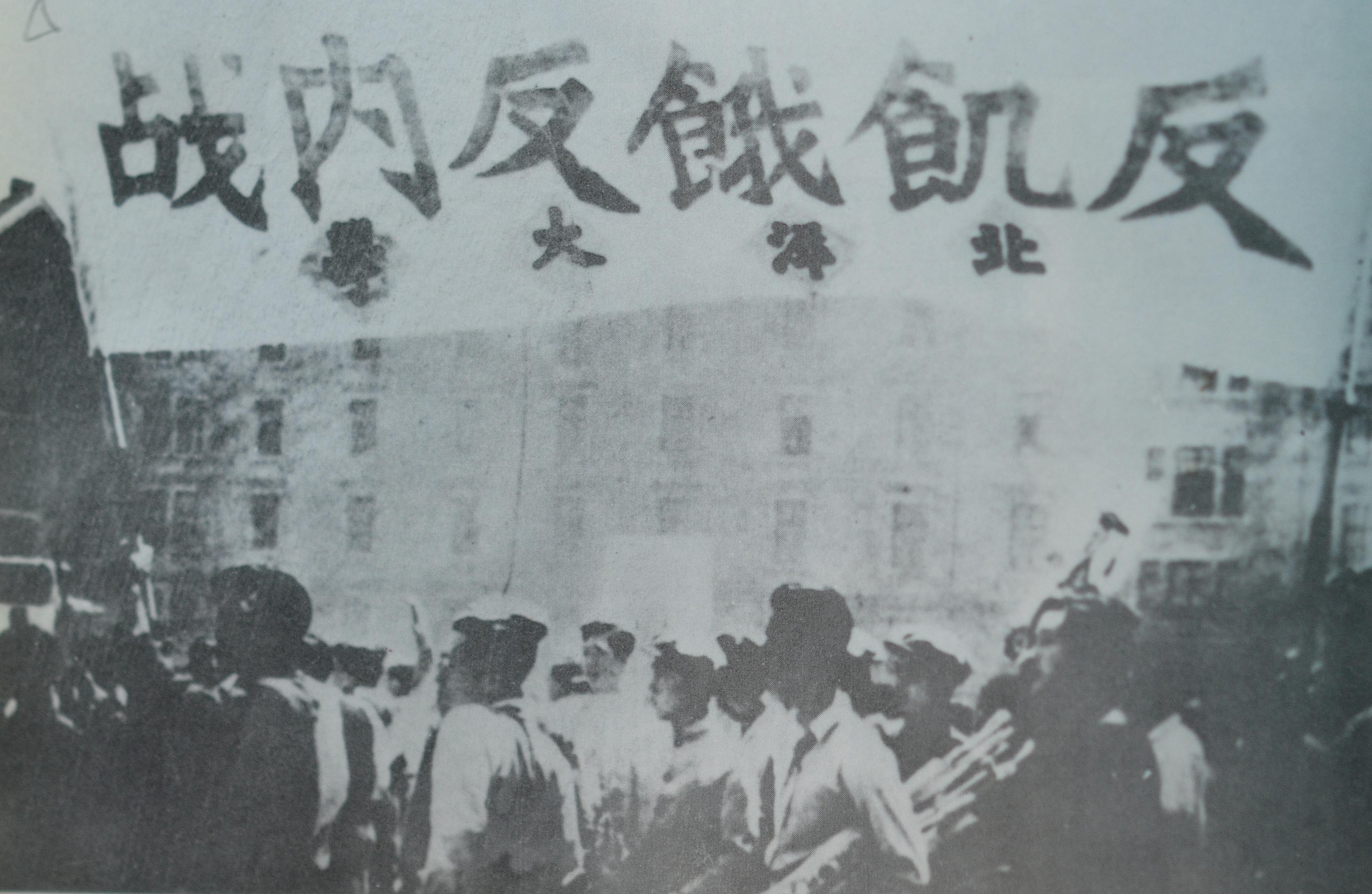 中文（中国大陆）: 1947年5月20日，天津学生举行“反饥饿、反内战”大游行